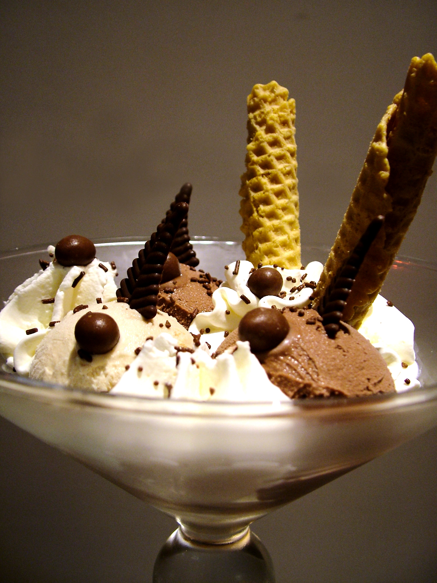 Ice Cream dessert